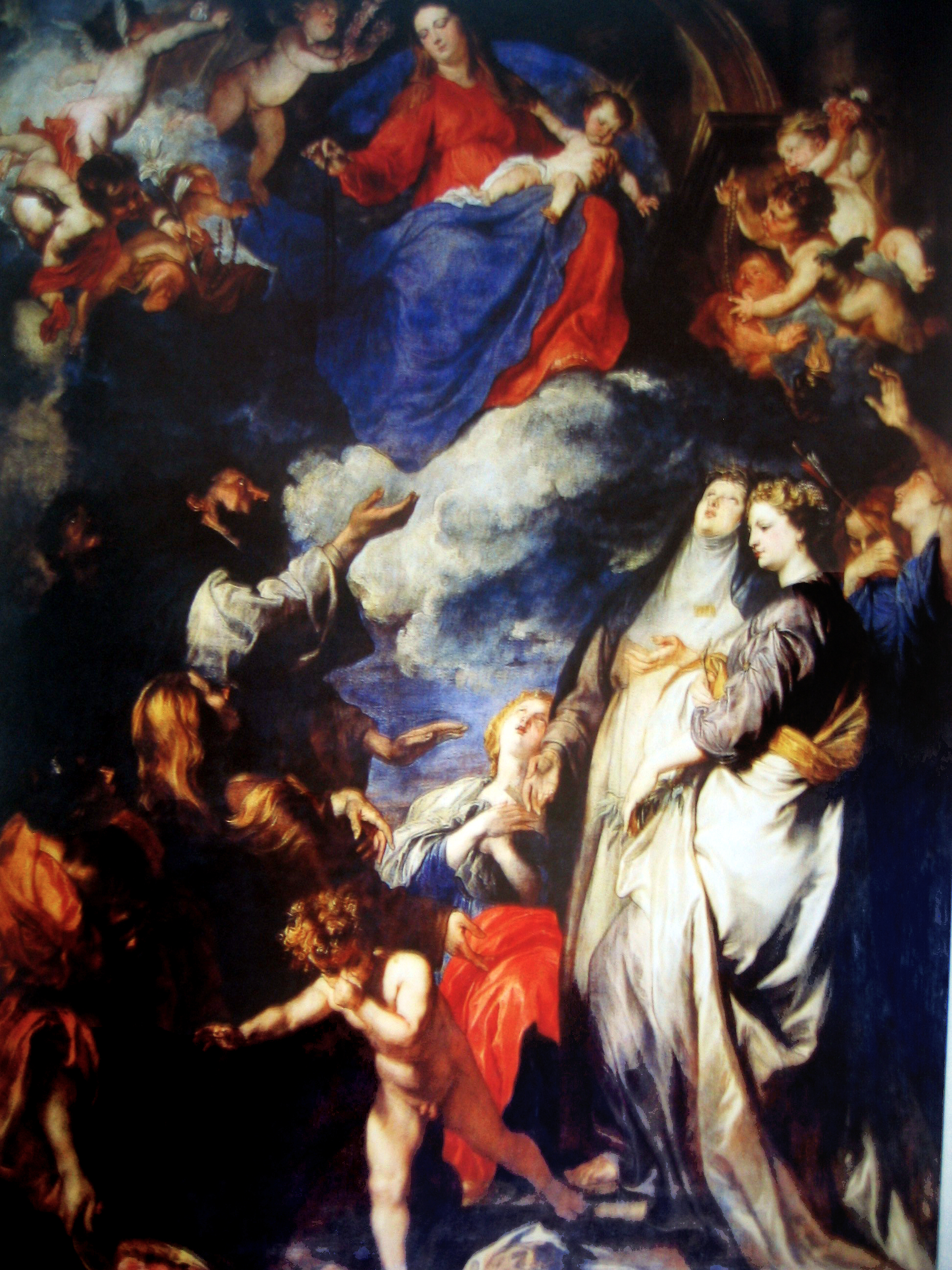 Madonna del Rosario con San Domenico e Santa Caterina da Siena, e i santi Vincenzo Ferreri, Oliva, Ninfa, Agata, Cristina e Rosalia: olio su tela di Antoon van Dyck. Palermo, Oratorio del Rosario di San Domenico.